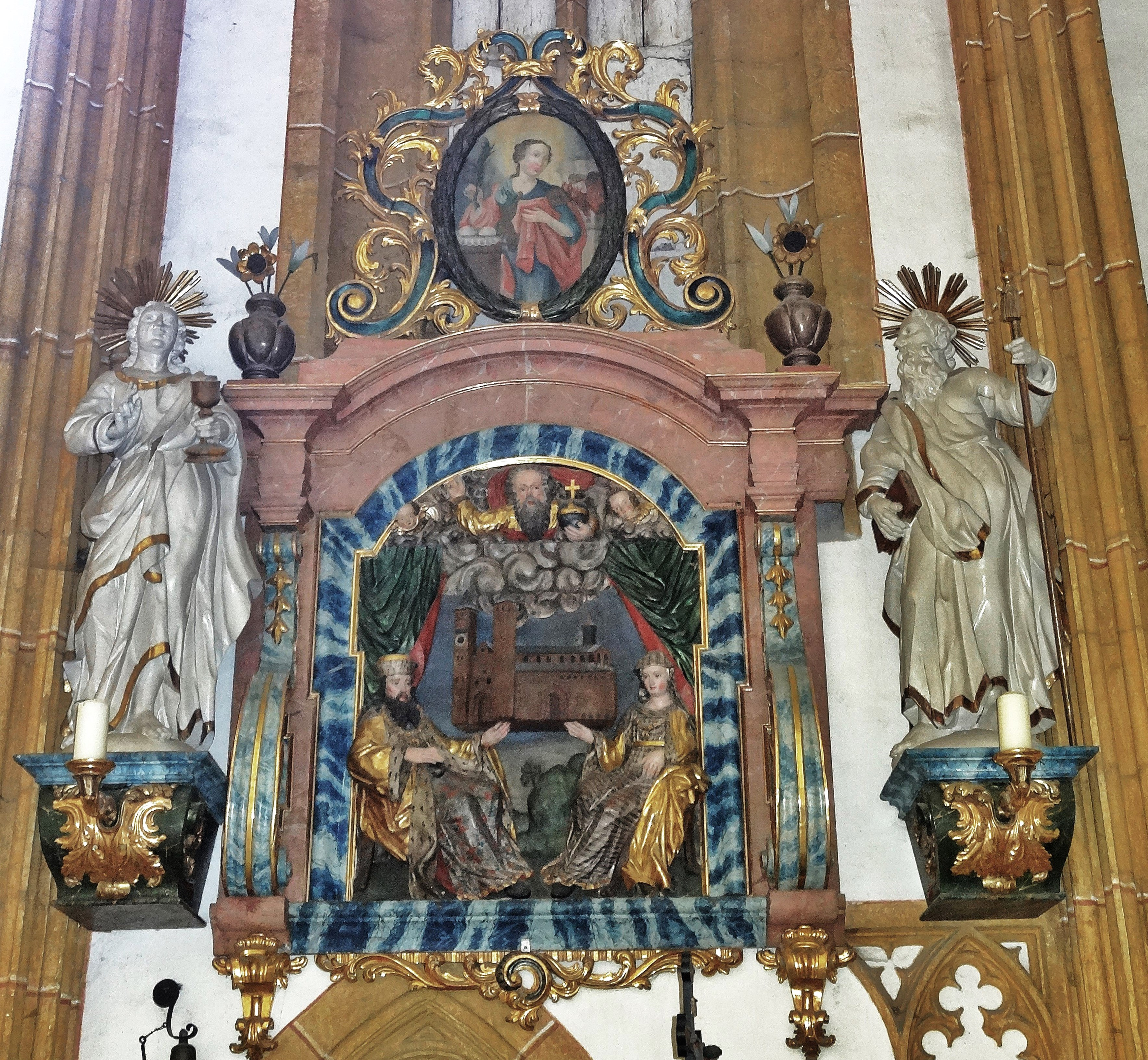 Pfarrkirche Lieding, Reliefdarstellung der hl. Hemma und ihres Mannes Wilhelm zur Stiftung des Gurker Doms